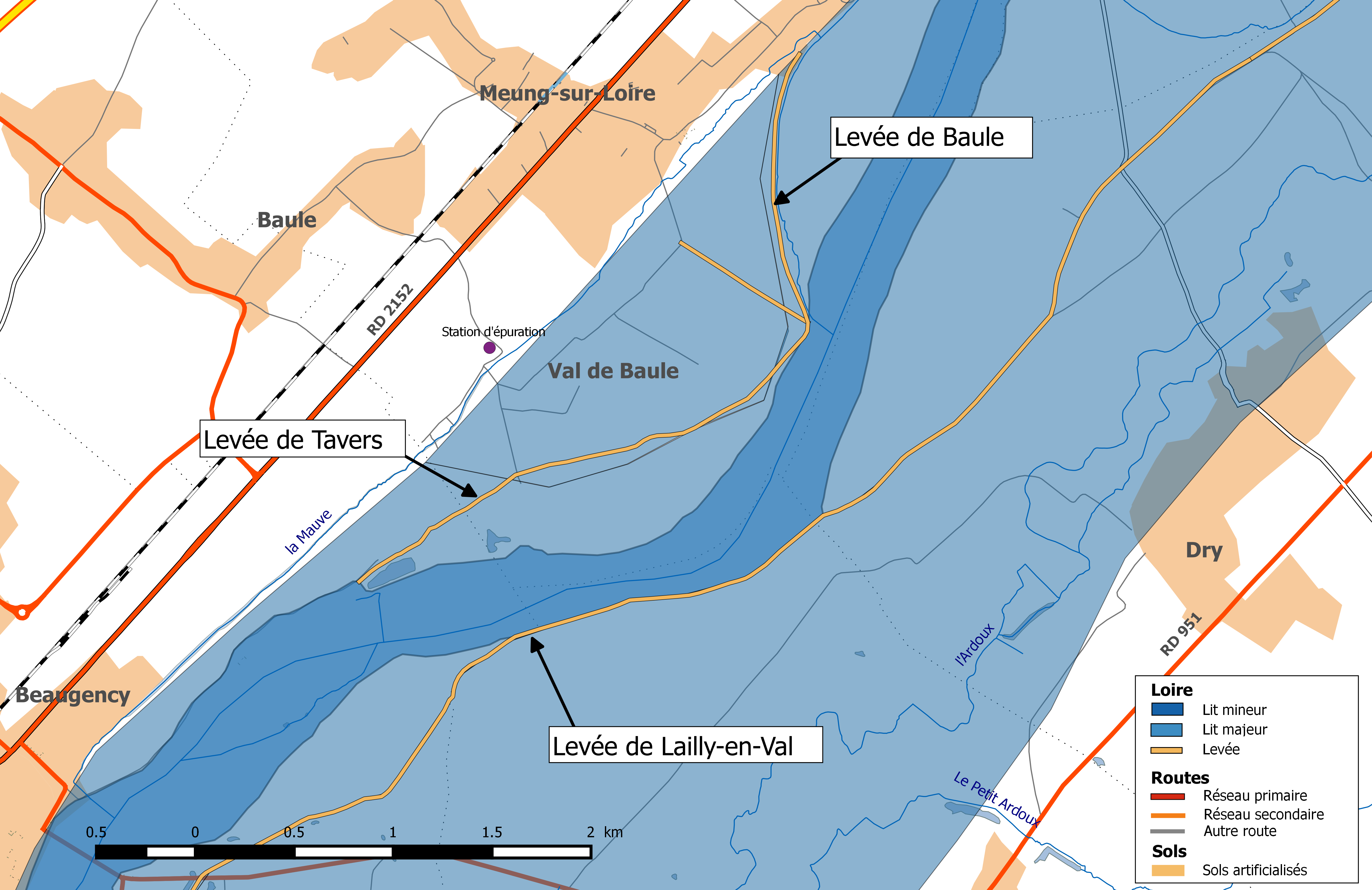 Système d'endiguement de la Loire dans le département du Loiret. Val de la Baule